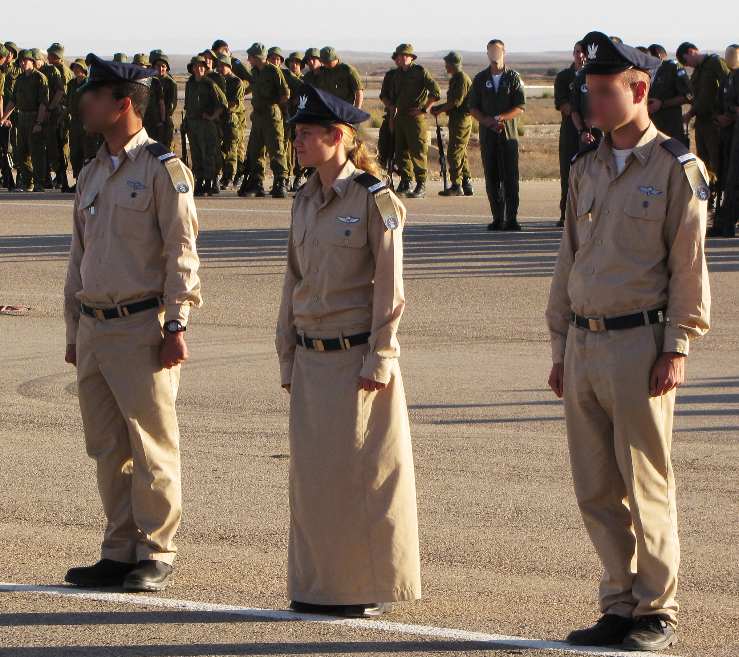 Tamar Ariel